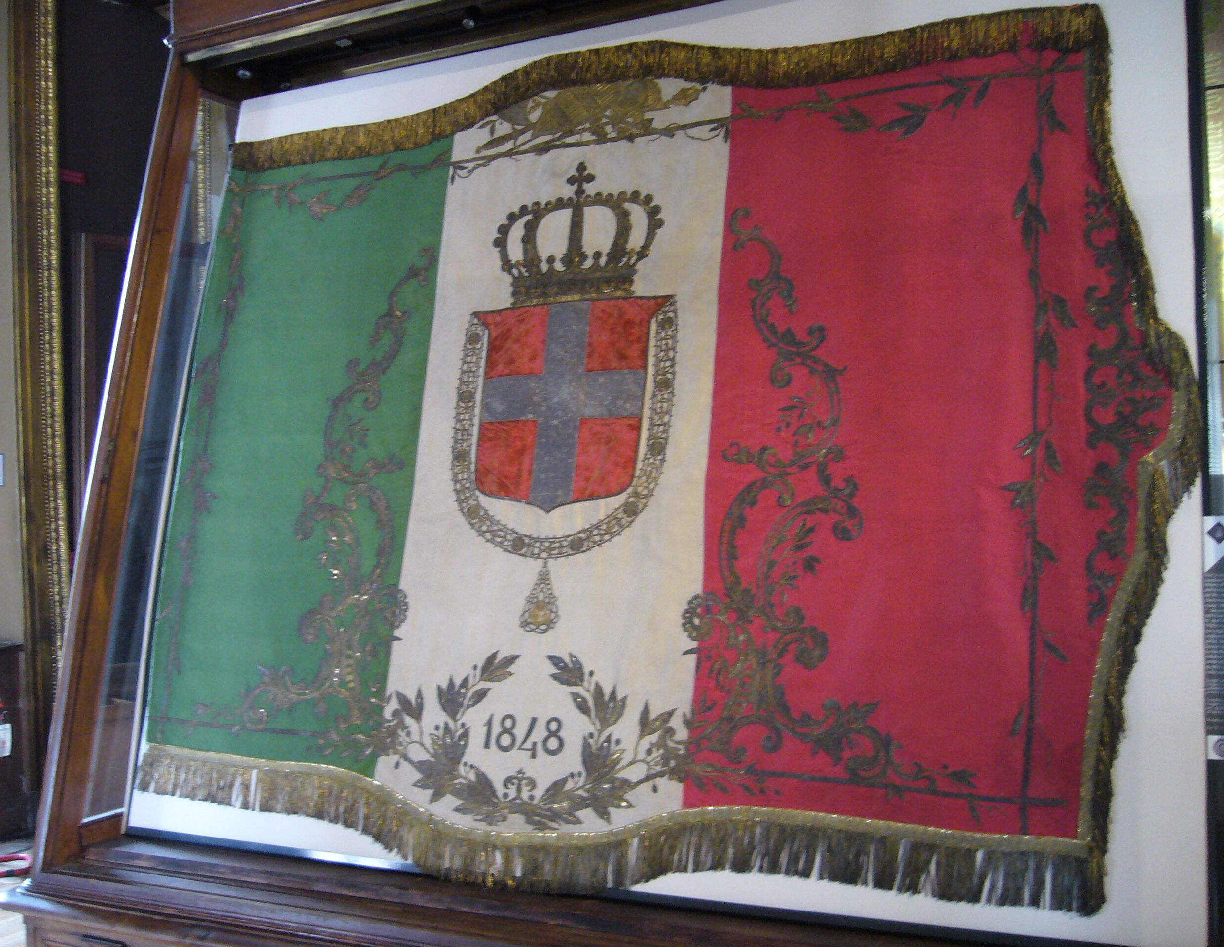 Bandiera donata a Carlo Alberto dalle donne milanesi nella primavera-estate 1848 conservata nell'armeria del palazzo reale di Torino.